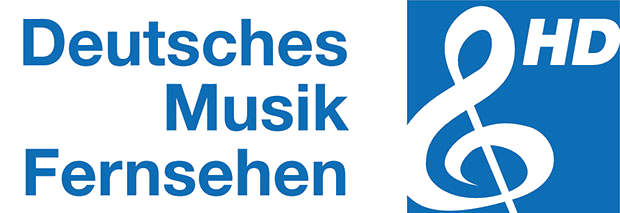 Logo von Deutsches Musik Fernsehen HD